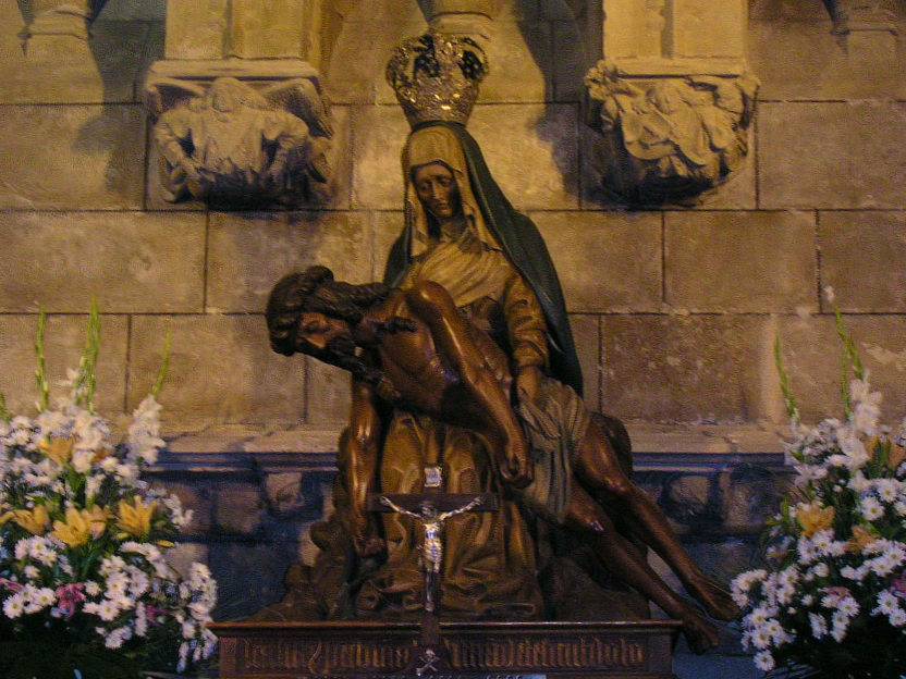 Imagen de la Virgen del Camino en la Catedral de León